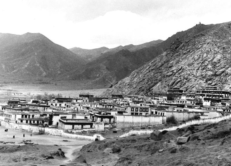 Lhasa, Kloster Sera